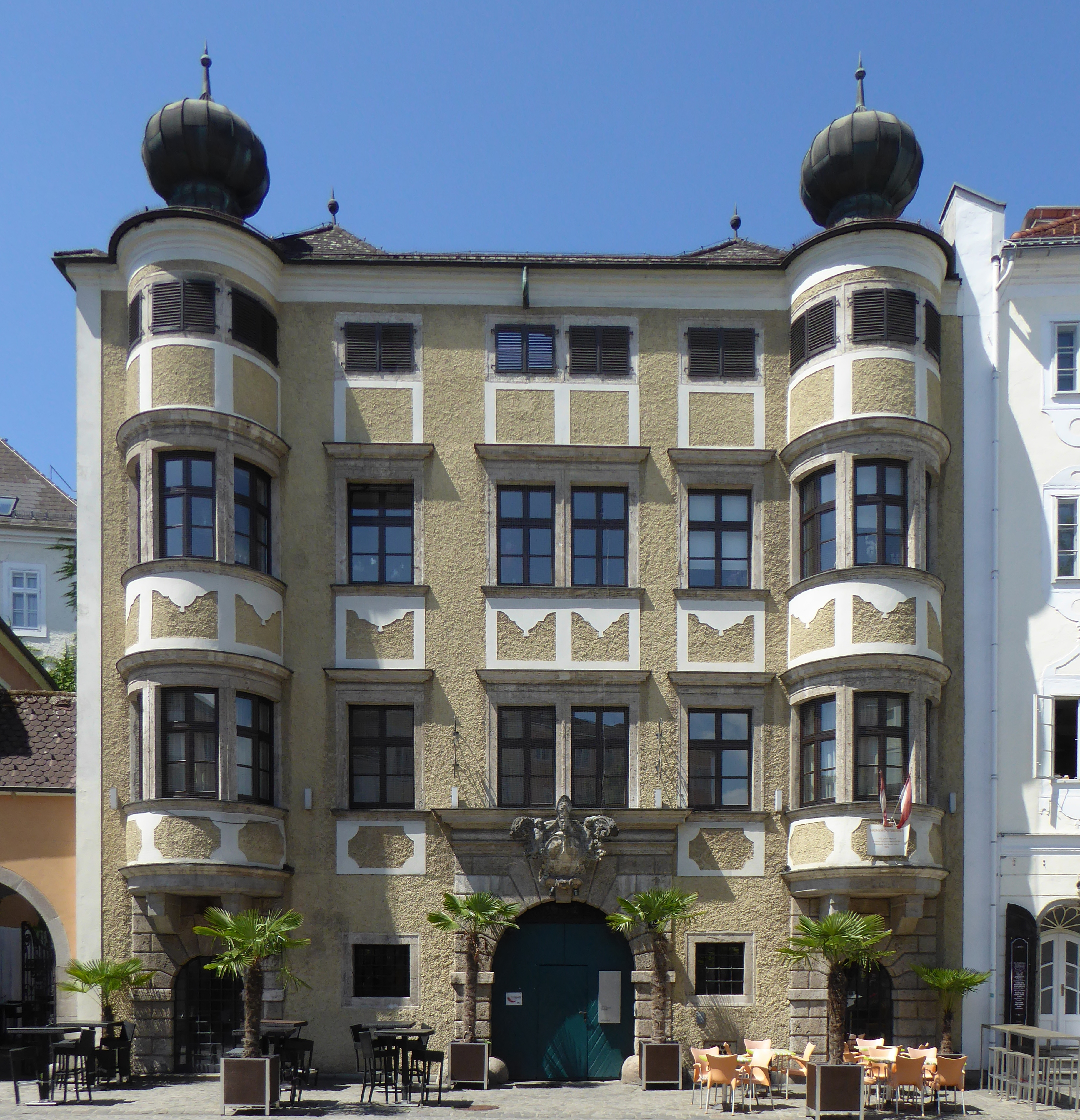 Das ehemalige Kremsmünsterer Stiftshaus in Linz.